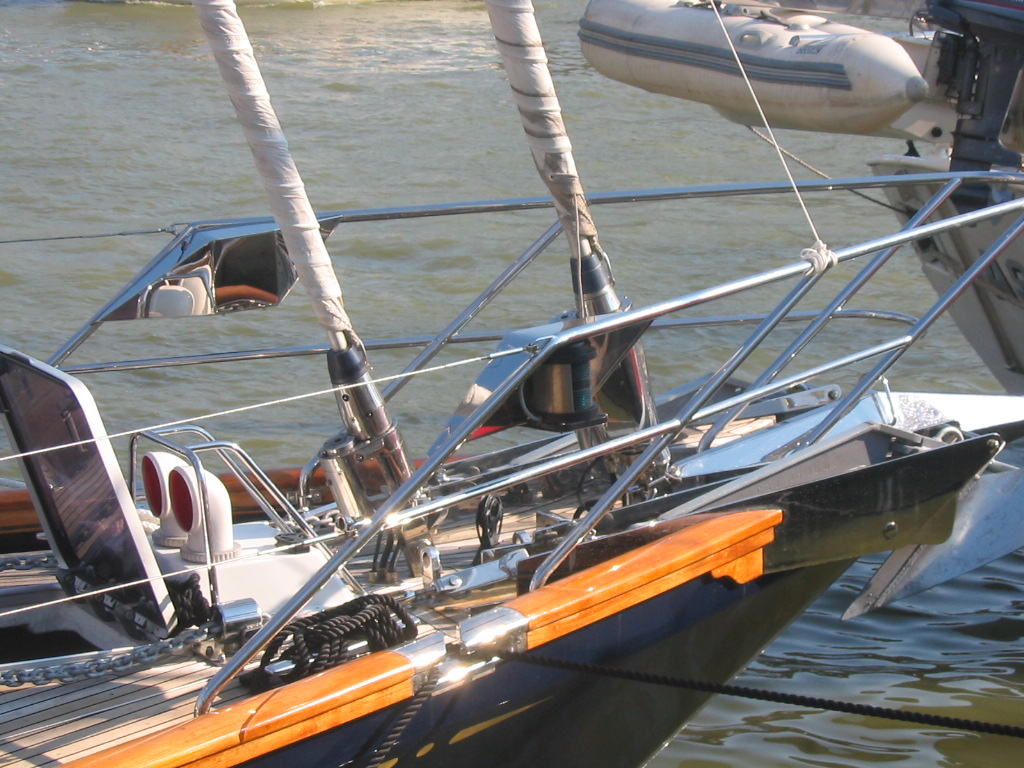 Dziób łodki